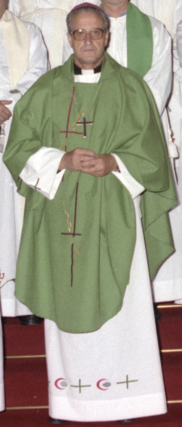 Jose Maria Setien, etarra de sacristía, apezpikua 1988an